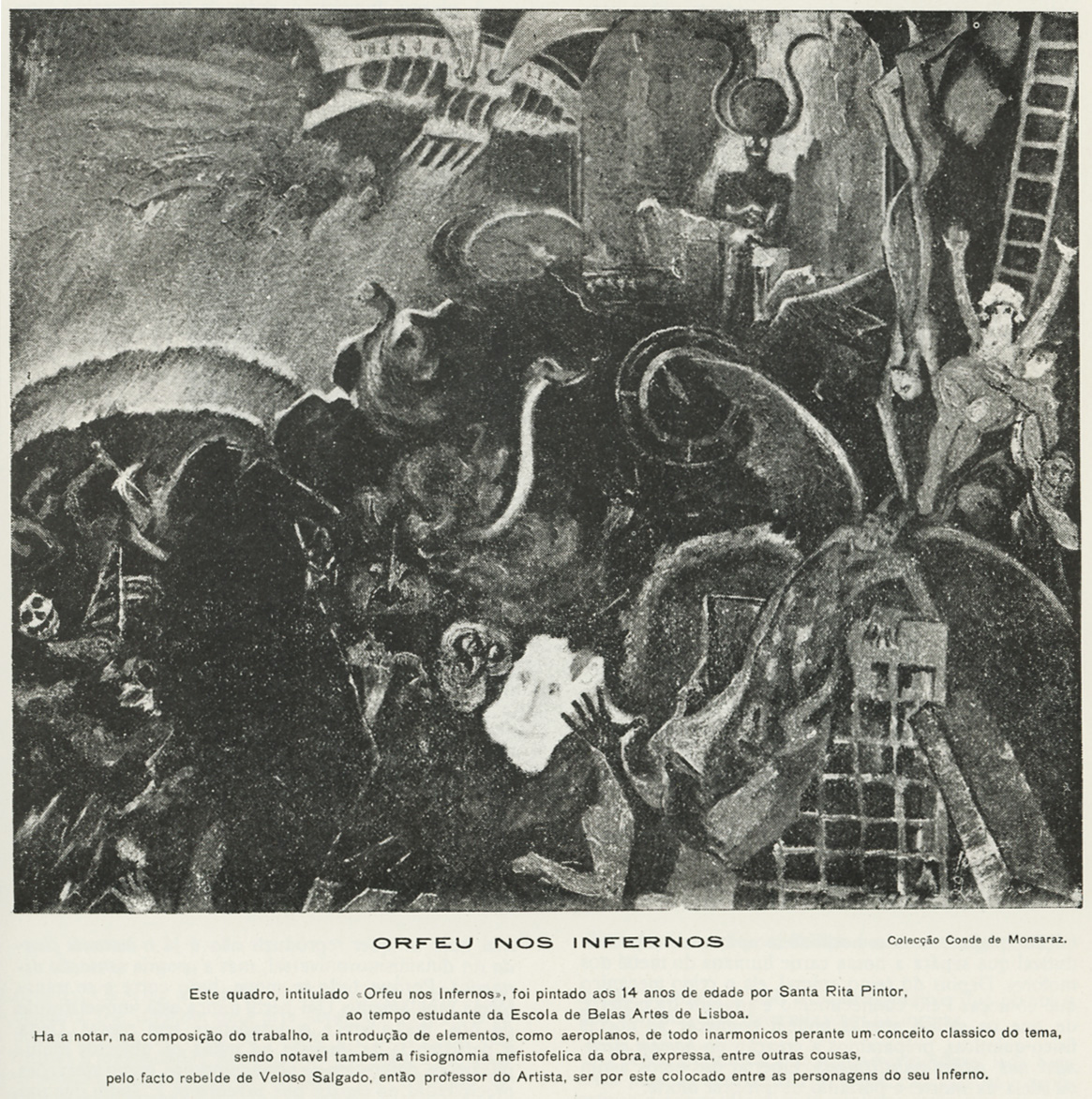 Guilherme de Santa-Rita, Orfeu nos Infernos, c. 1904 (data desconhecida), óleo sobre tela, 55,0 x 65,5 cm